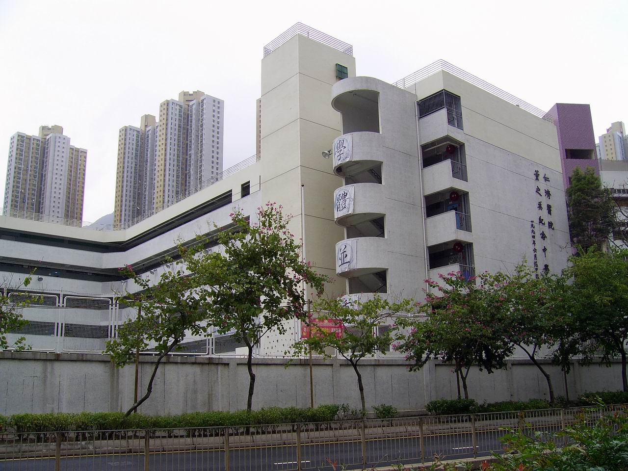 仁濟醫院董之英紀念中學